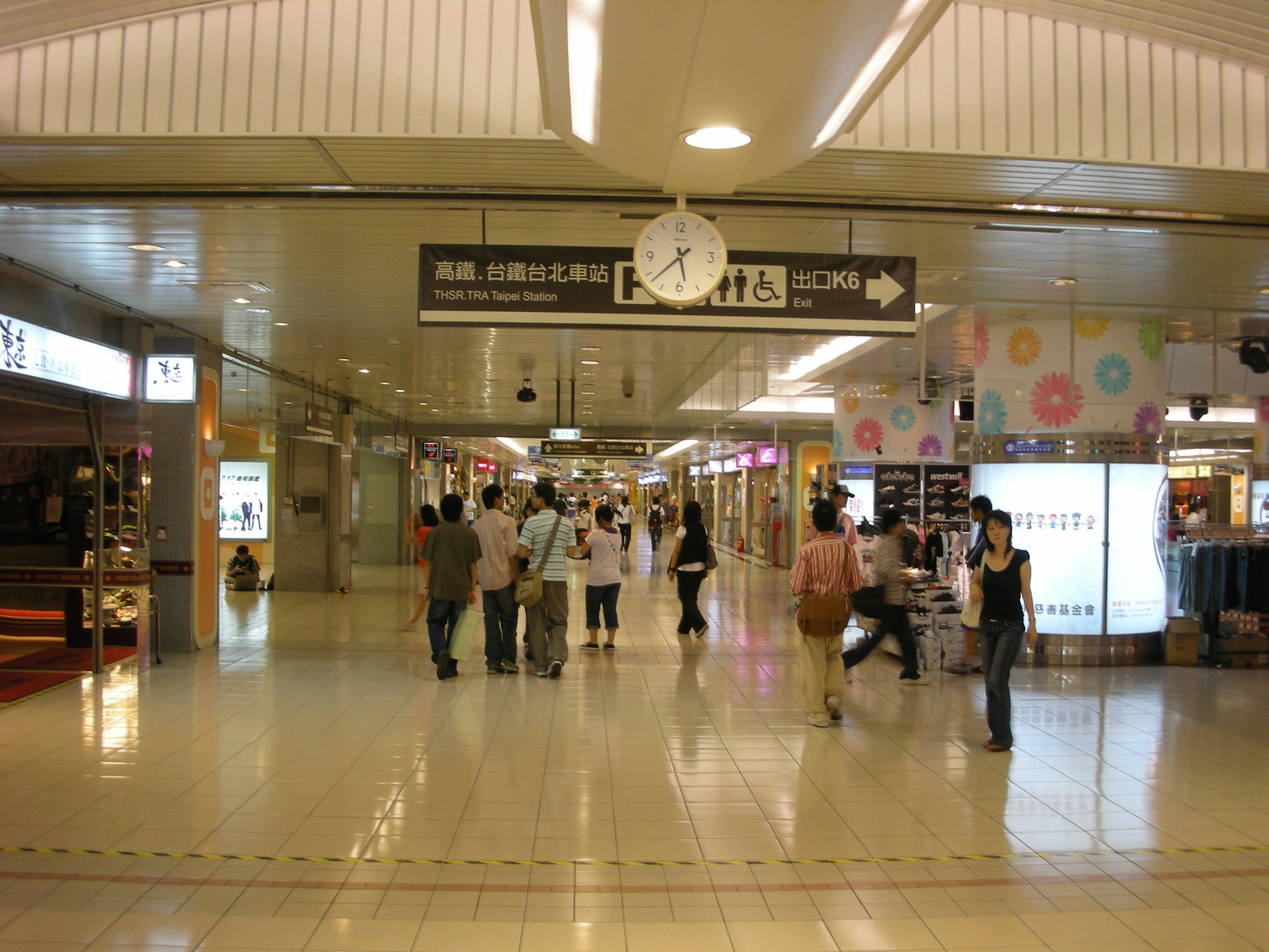 台北新世界購物中心往K6出口。